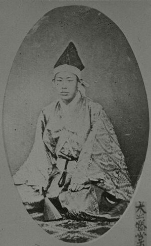 藤堂高潔の肖像写真。